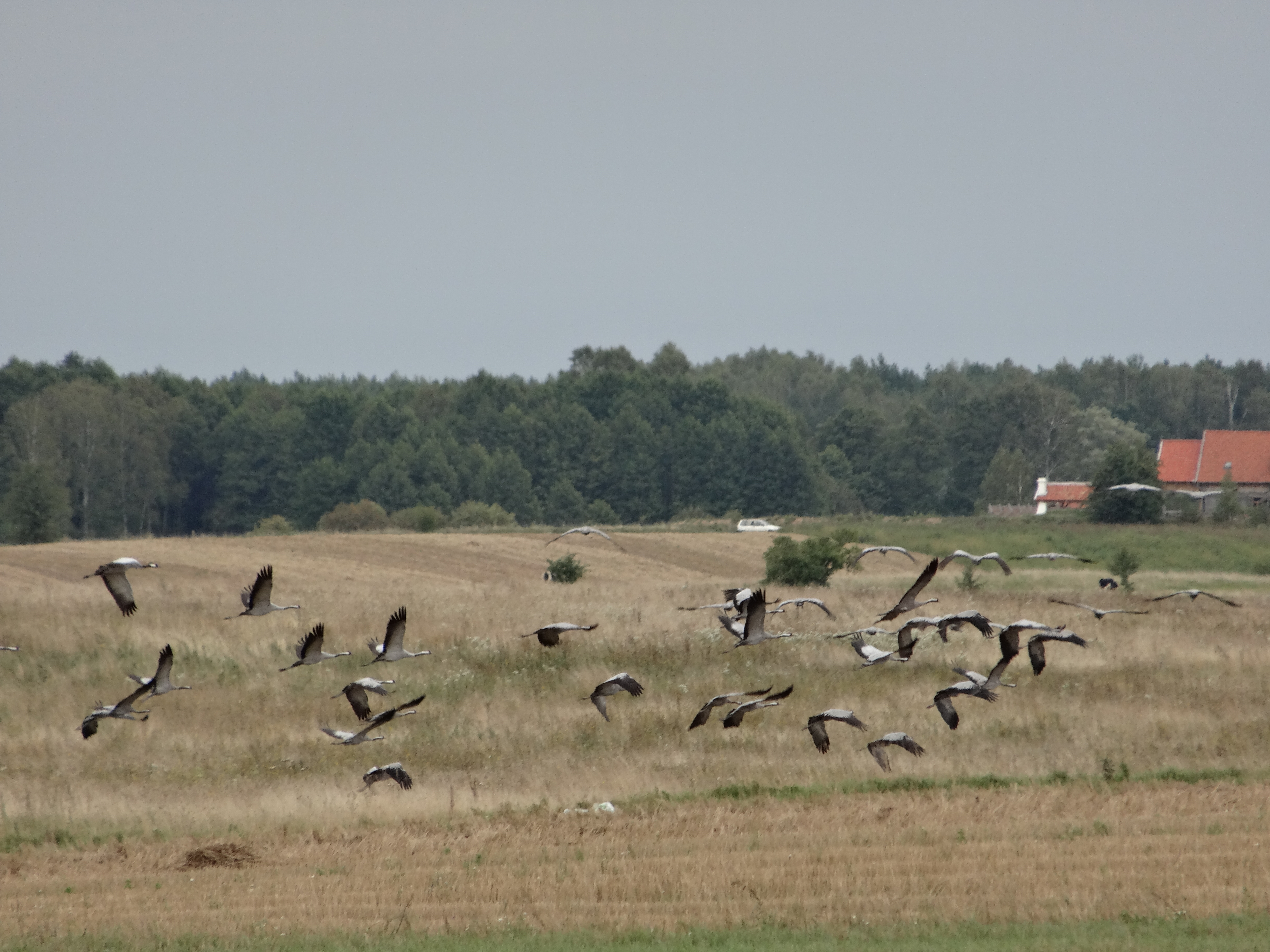 Zdory - żurawie w locie